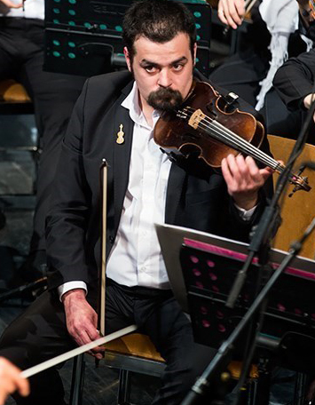 پدرام فریوسفی - آیین بازگشایی ارکستر سمفونیک تهرا - ۲۶ اسفند ۱۳۹۳